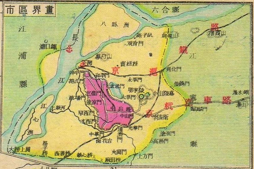 亚新地学社1936年《袖珍中华全图》中的南京市地图部分